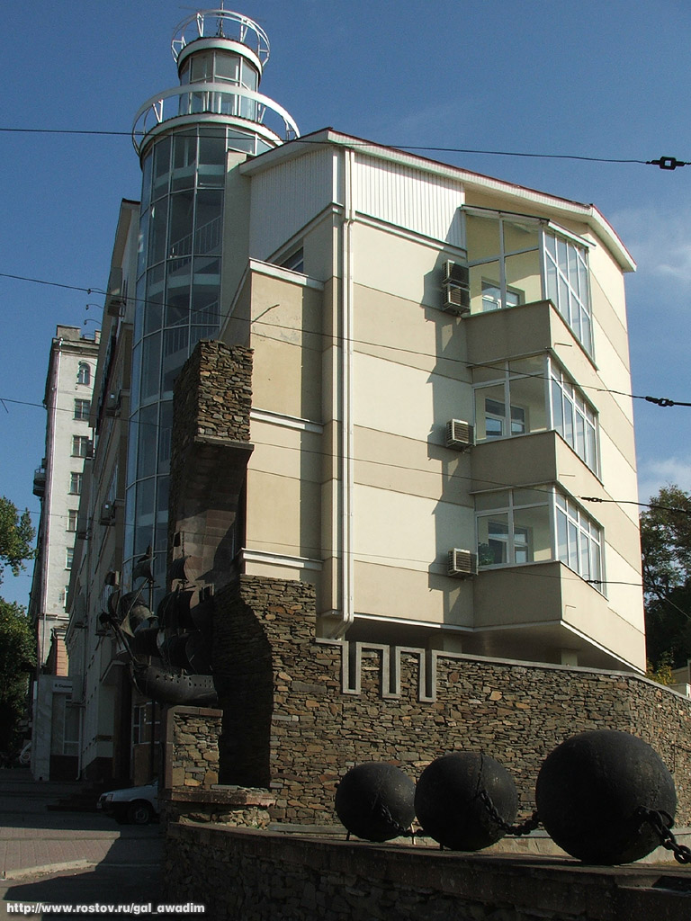 Редакция газеты "Вечерний Ростов"